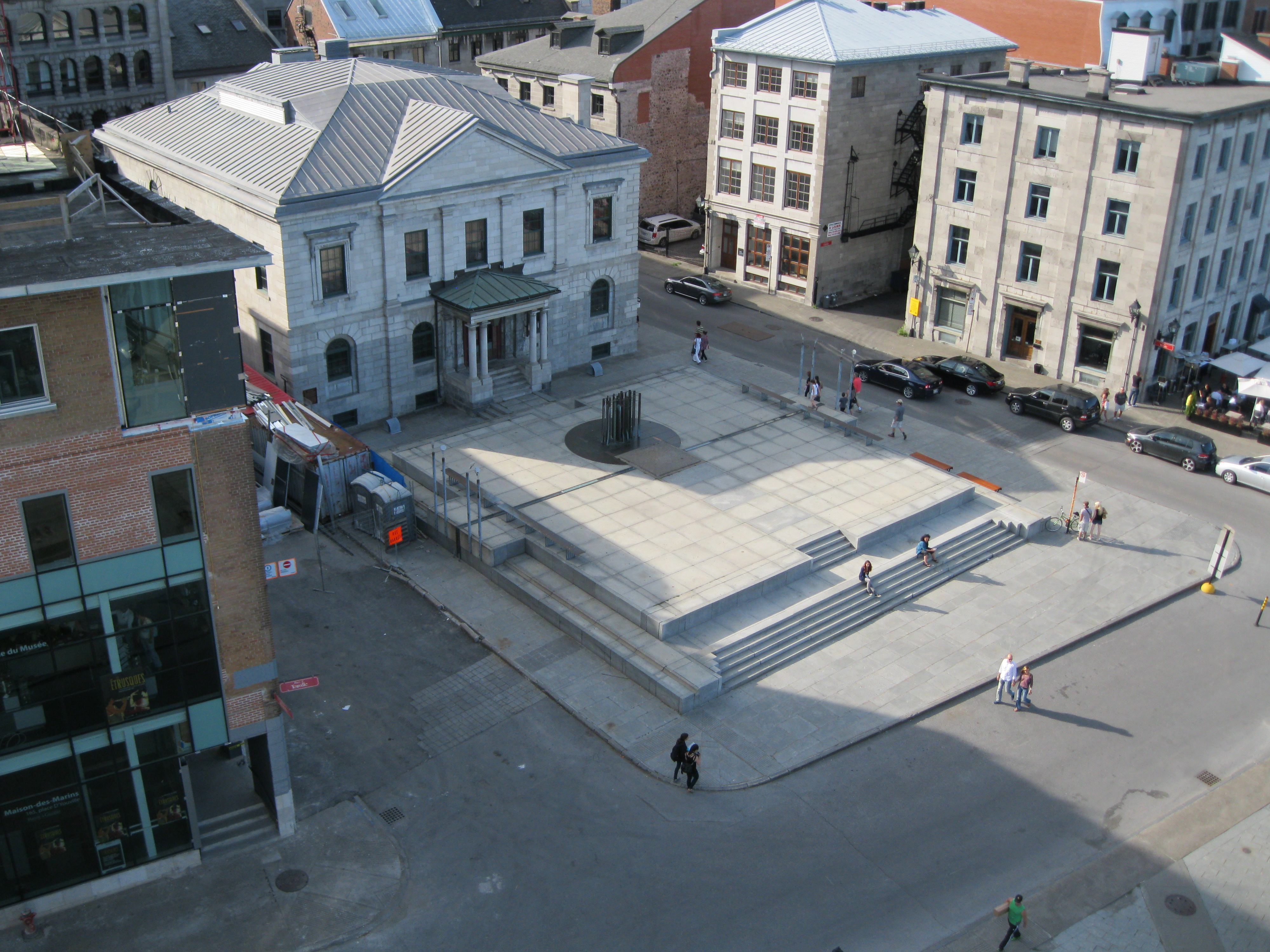 Vues du belvédère de l'Éperon du musée de Pointe-à-Callière, Montréal